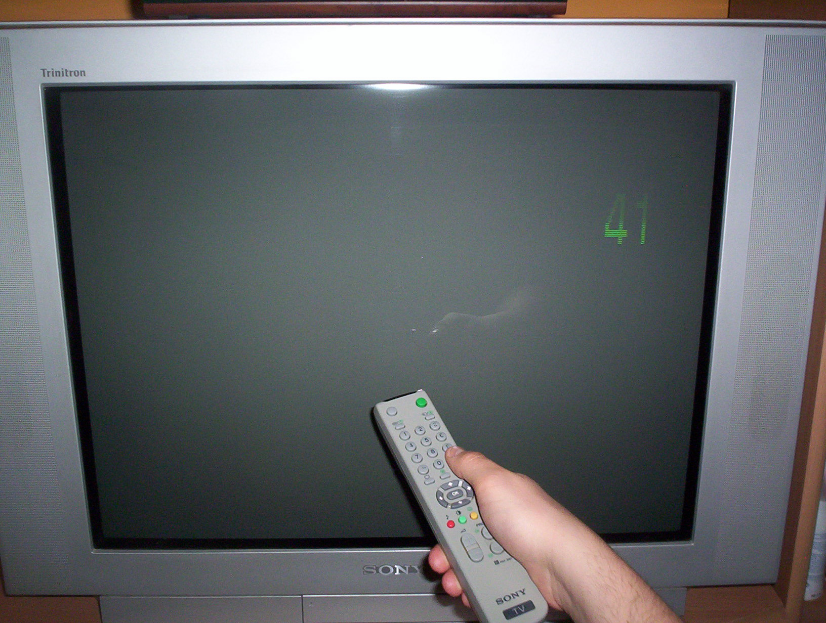 A szülő a távirányító segítségével könnyen beprogramozhatja a nem kívánt tartalmak tiltását.